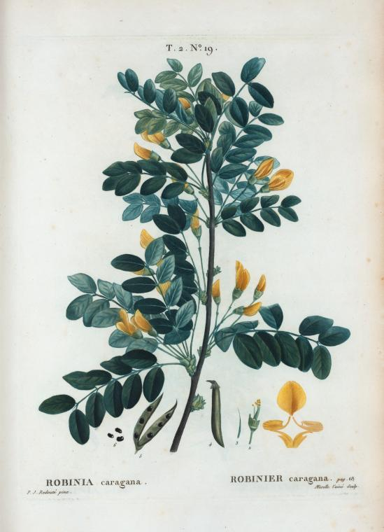 Robinia caragana = Robinier caragana.